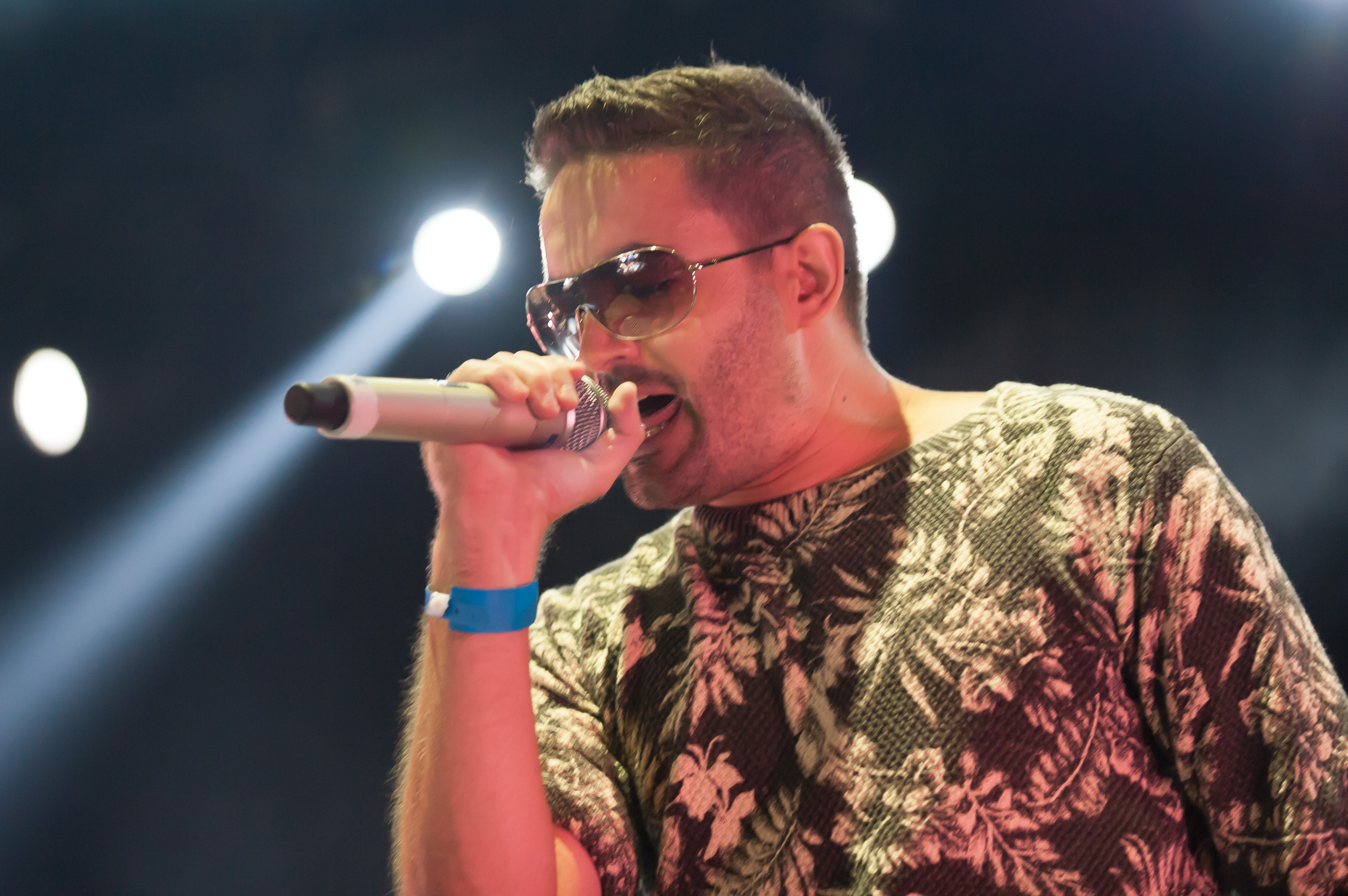 DSDS - Live on Tour 27. Juli 2014, Stadthalle Wien Menderes Bagci